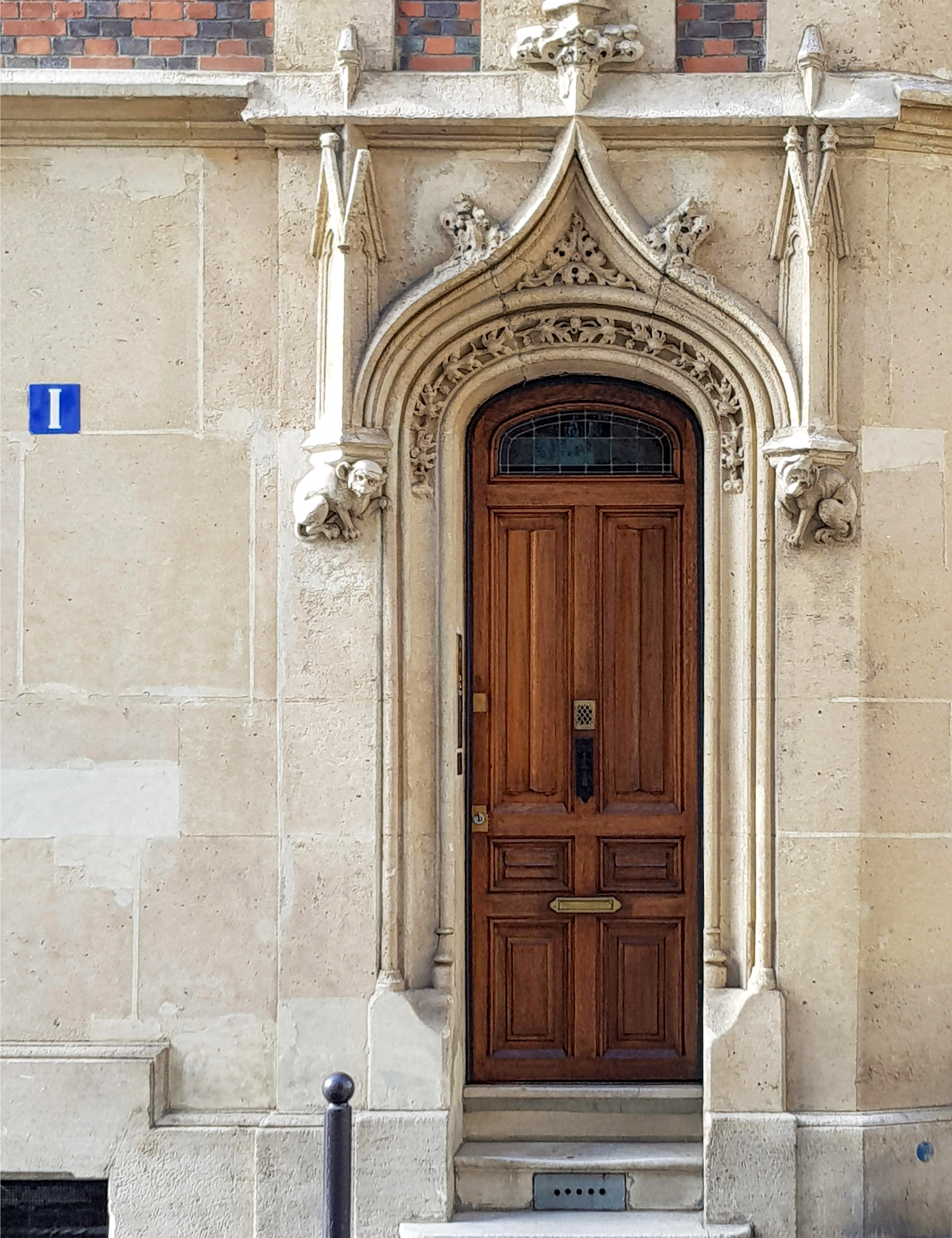 Entrée du 1 rue Greuze, Paris 16e. Immeuble néo-gothique construit en 1883.